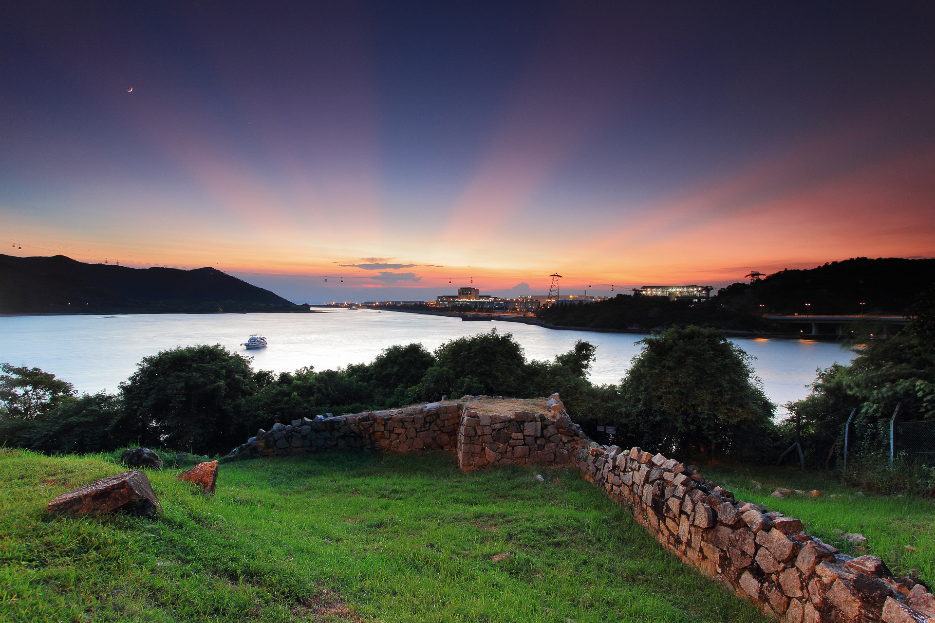 站在此炮台上，欣賞美艷晚霞曙暮暉之同時，從昔日赤鱲角島鄉土風情，現在機場與纜車之繁榮，甚至他朝的港珠澳大橋，都體現了時代的巨輪演變。